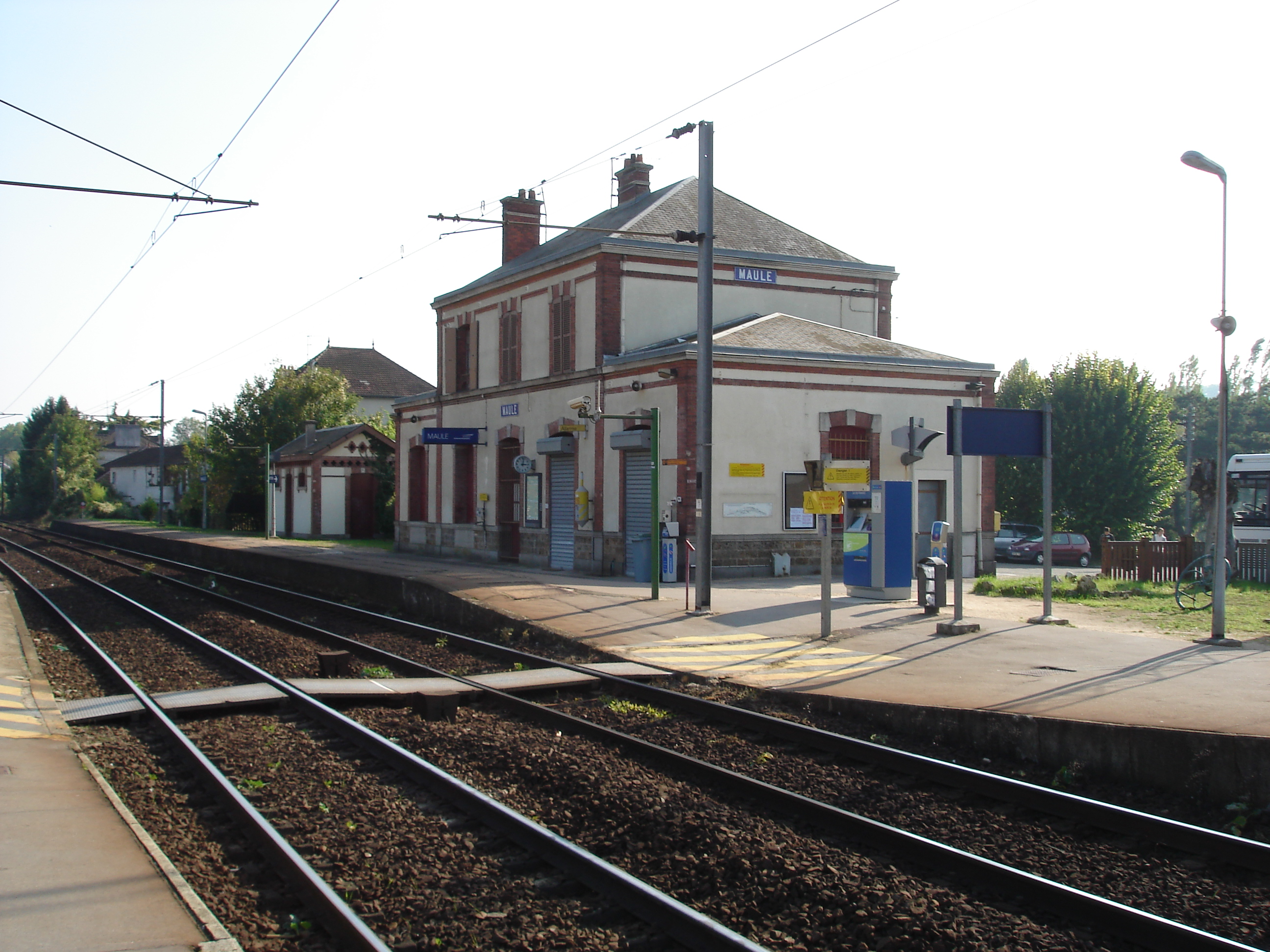 Gare de Maule (78) : Le bâtiment voyageurs et la traversée de voie par les piétons.